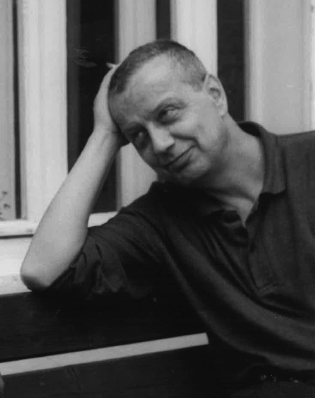 Jan Kašpar v Kunštátu v roce 2000